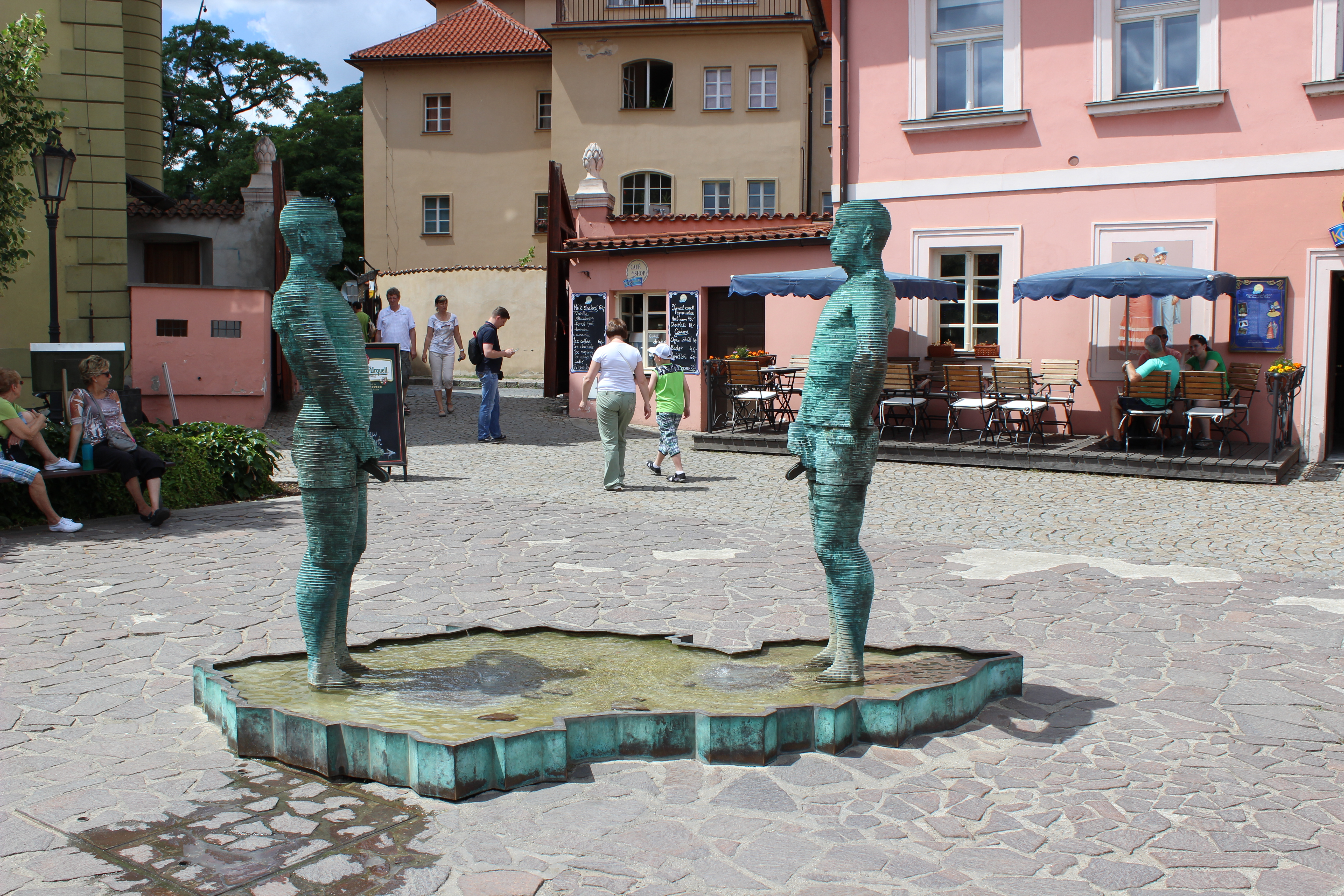 Socha "Proudy" nebo "Piss" od Davida Černého umístěná v pražské Hergetově cihelně.